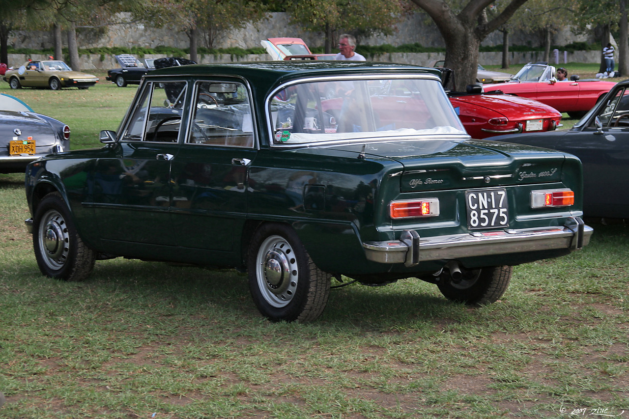 1970 Giulia 1600 Super - rvl